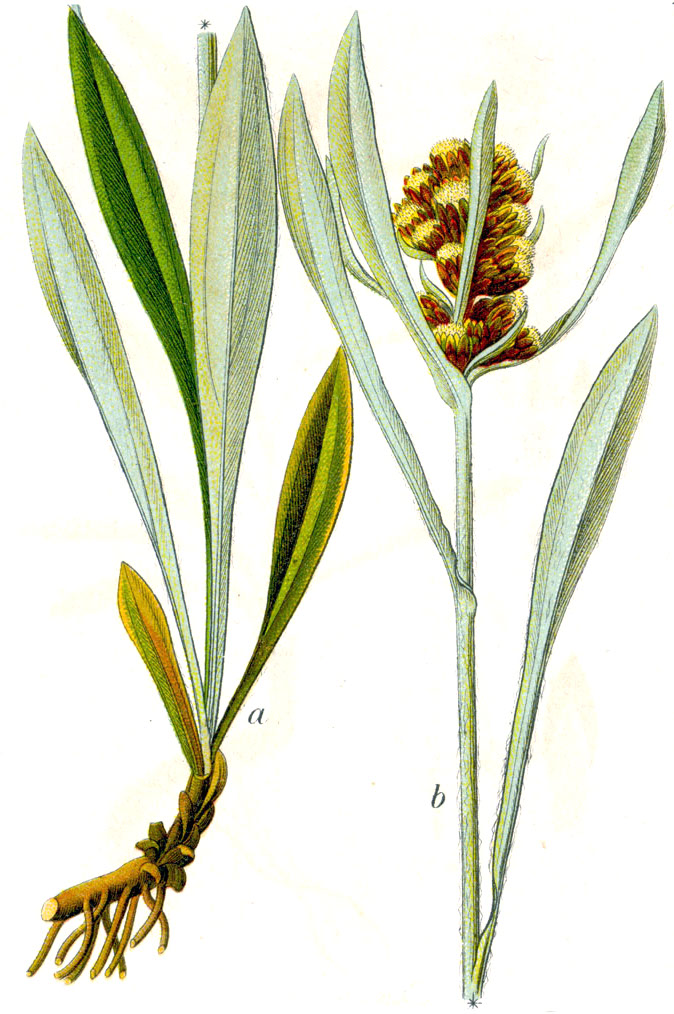 Gnaphalium norvegicum Gunnerus Original Caption Norwegisches Ruhrkraut, Gnaphalium norvegicum